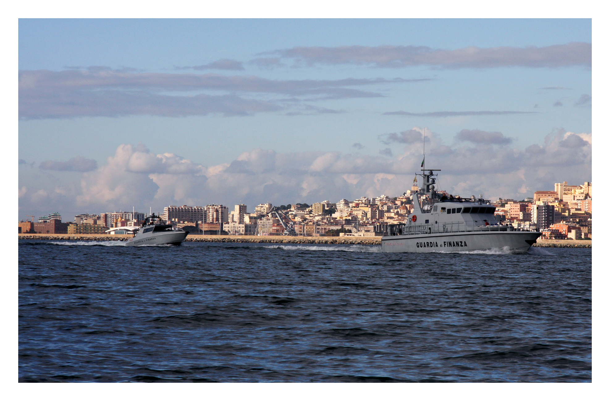 Unità Navali della Guardia di Finanza con la città di Cagliari come sfondo